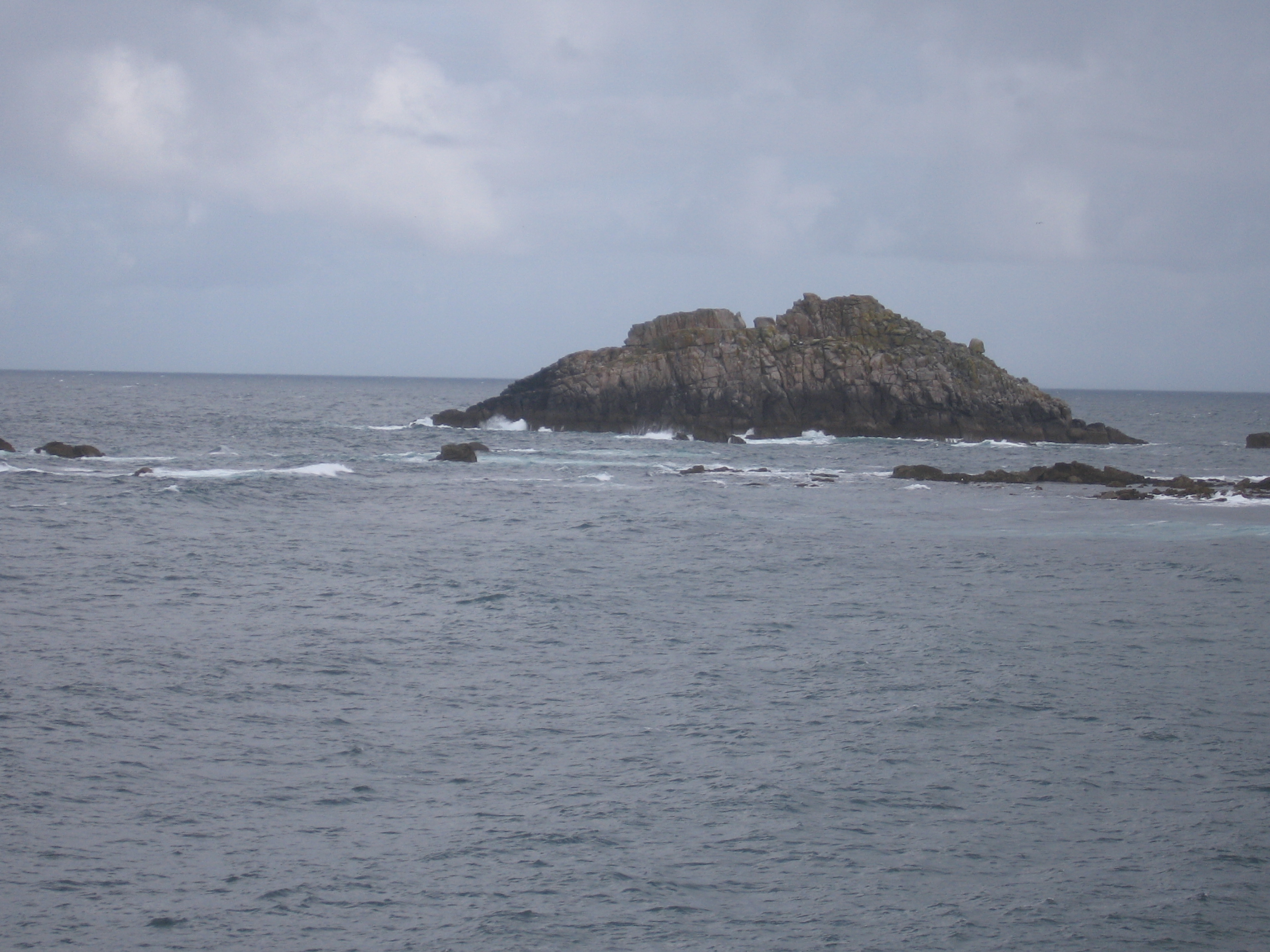 Men A Vaur, near Tresco.